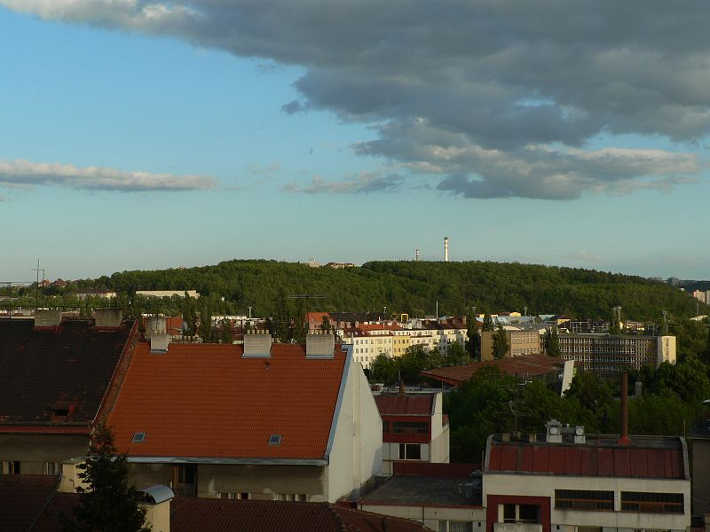 Bohdalec, Praha